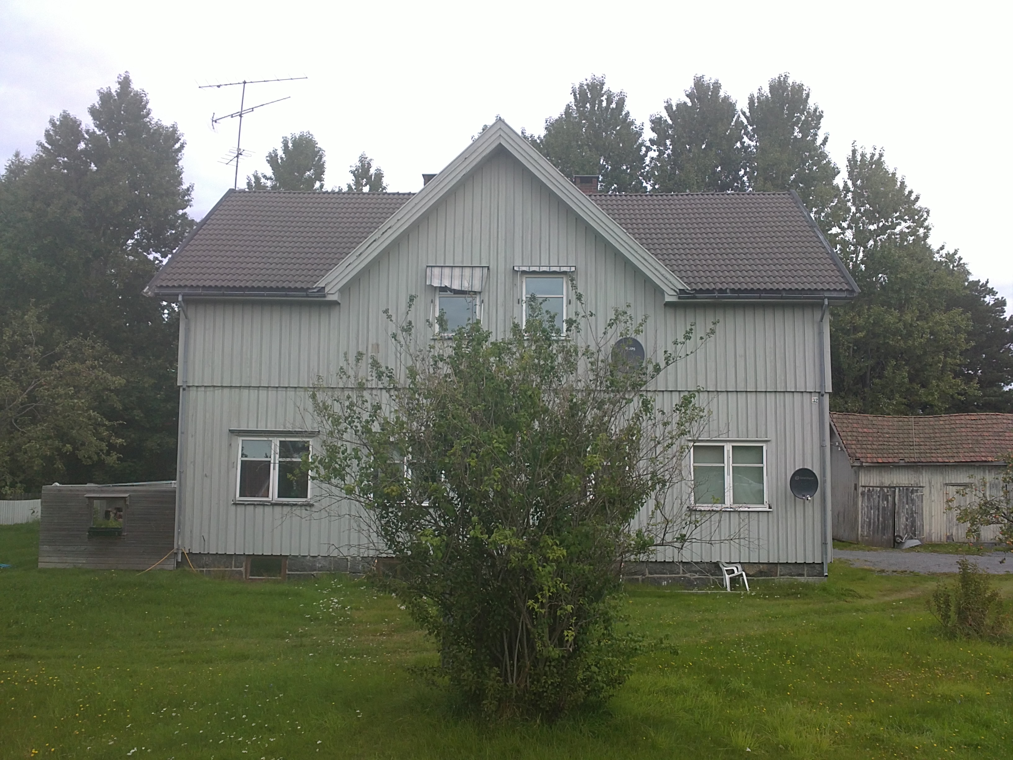 bilde av tidligere Undersbo skole, Tjøllingveien 32